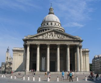 Description: Paris, août 2004. Photo du Panthéon Auteur: David Le Brun importé de [1]